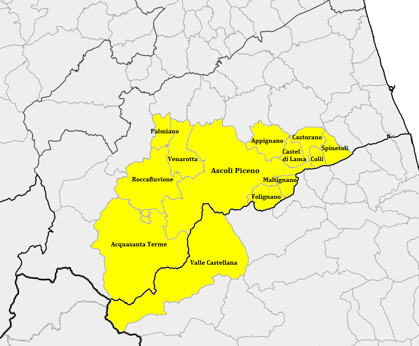 Area Metropolitana di Ascoli Piceno secondo la metodologia Function Urban Regions